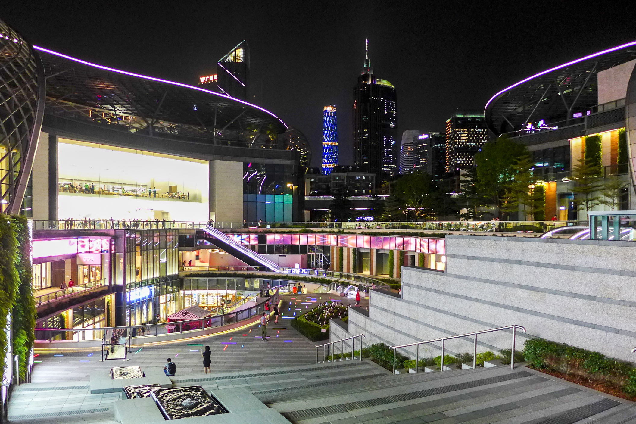 Parc Central